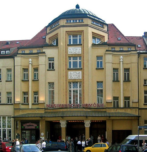 Leipzig, Germany: Musikalische Komödie, Dreilinden (operetta theatre)